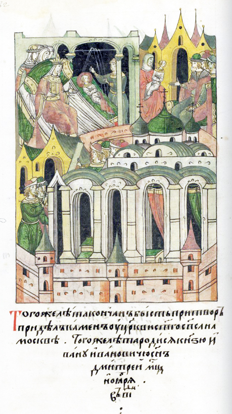 ЛИЦЕВОЙ ЛЕТОПИСНЫЙ СВОД В том же году закончили строить придел каменный к церкви святого Спаса на Москве. В том же году родился у князя Ивана Ивановича сын Дмитрий, месяца ноября в 12 день.